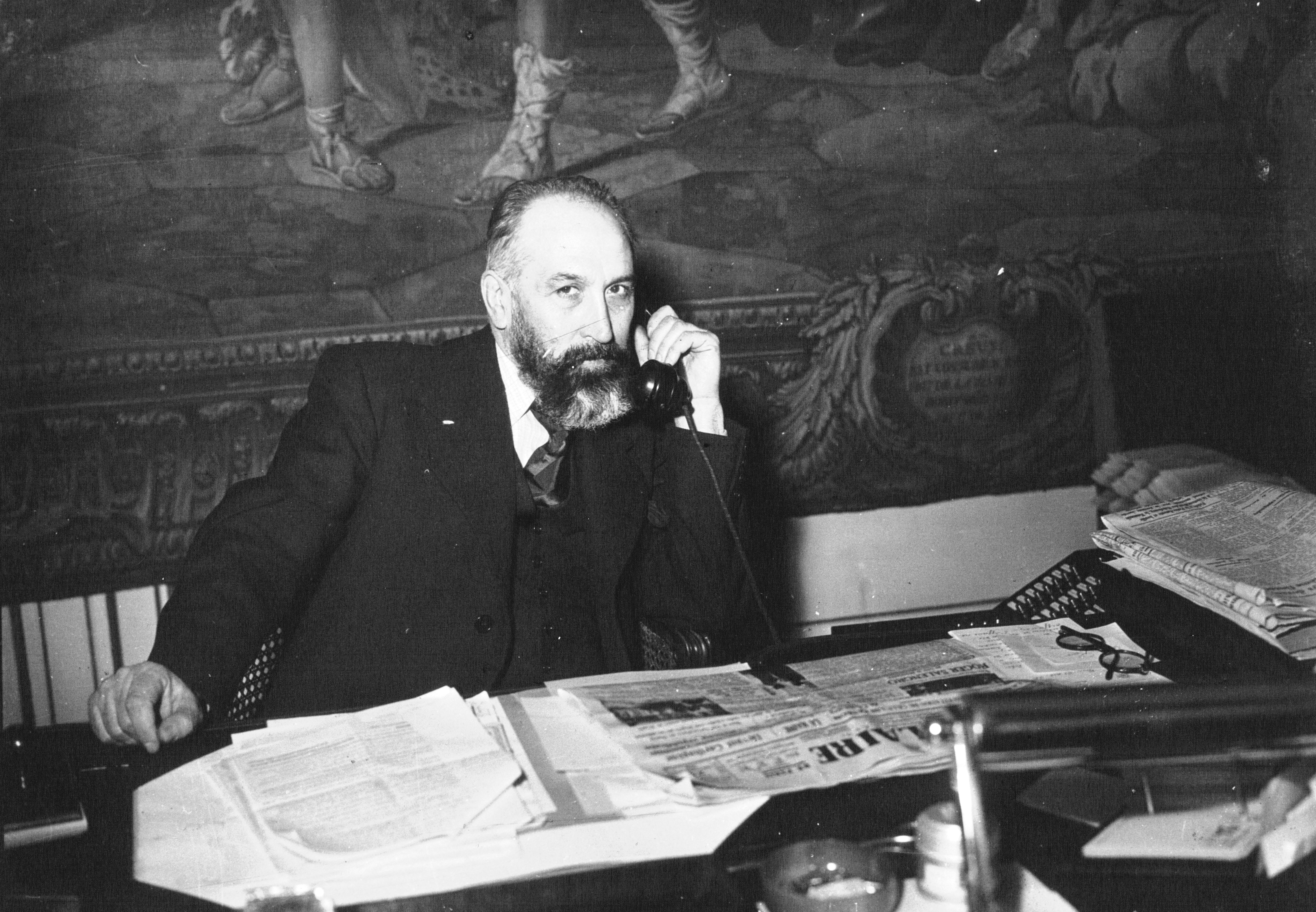 Portrait de Marx Dormoy, nouveau ministre de l'Intérieur : photographie de presse